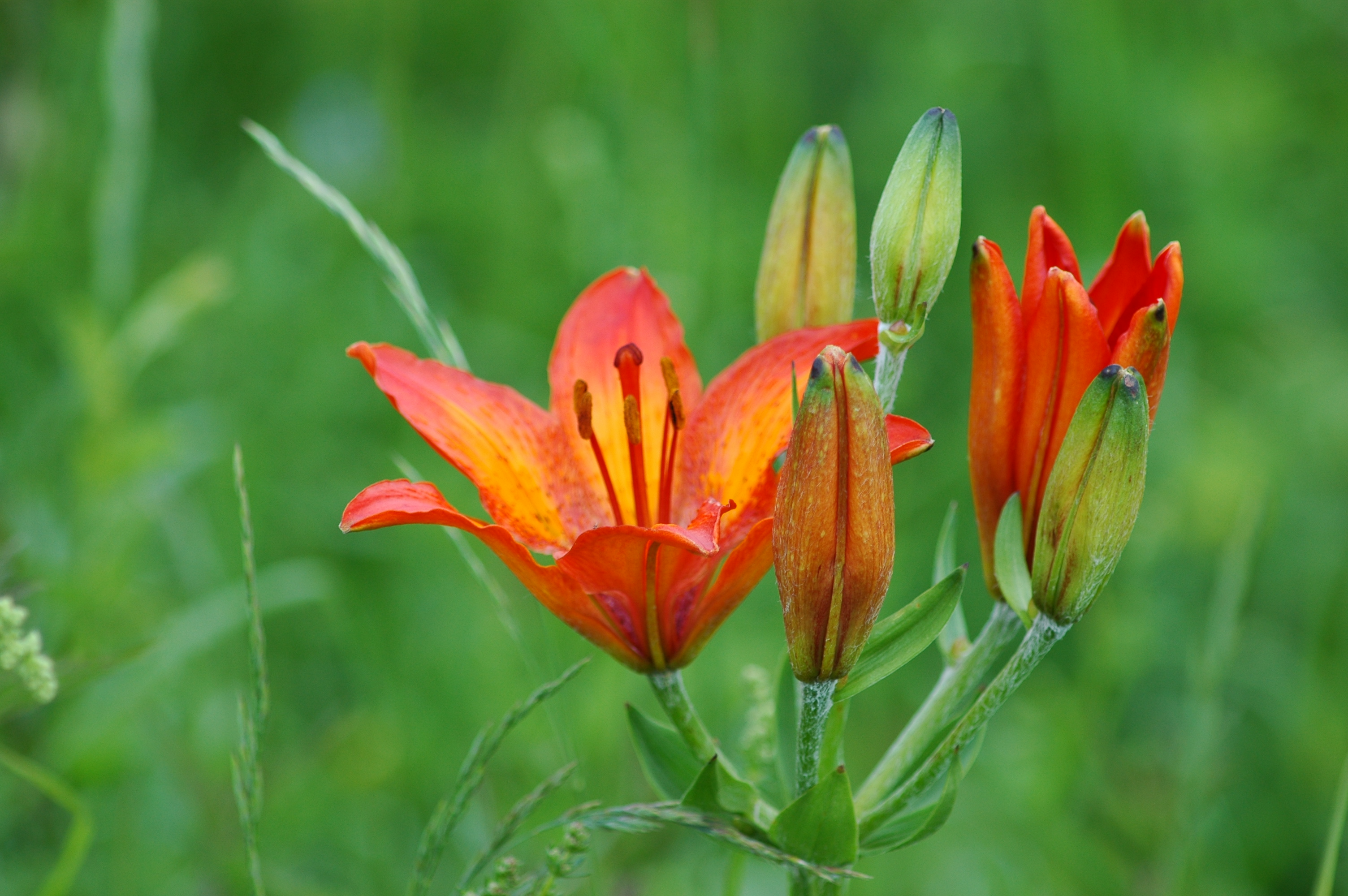 Kranjska lilija